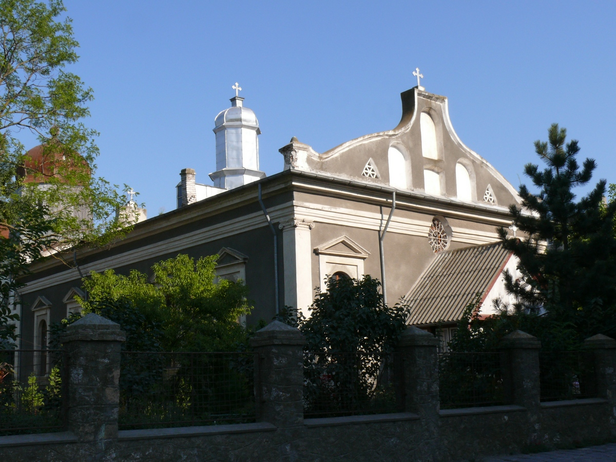 Ansamblul Bisericii ortodoxe grecești "Sf. Nicolae"